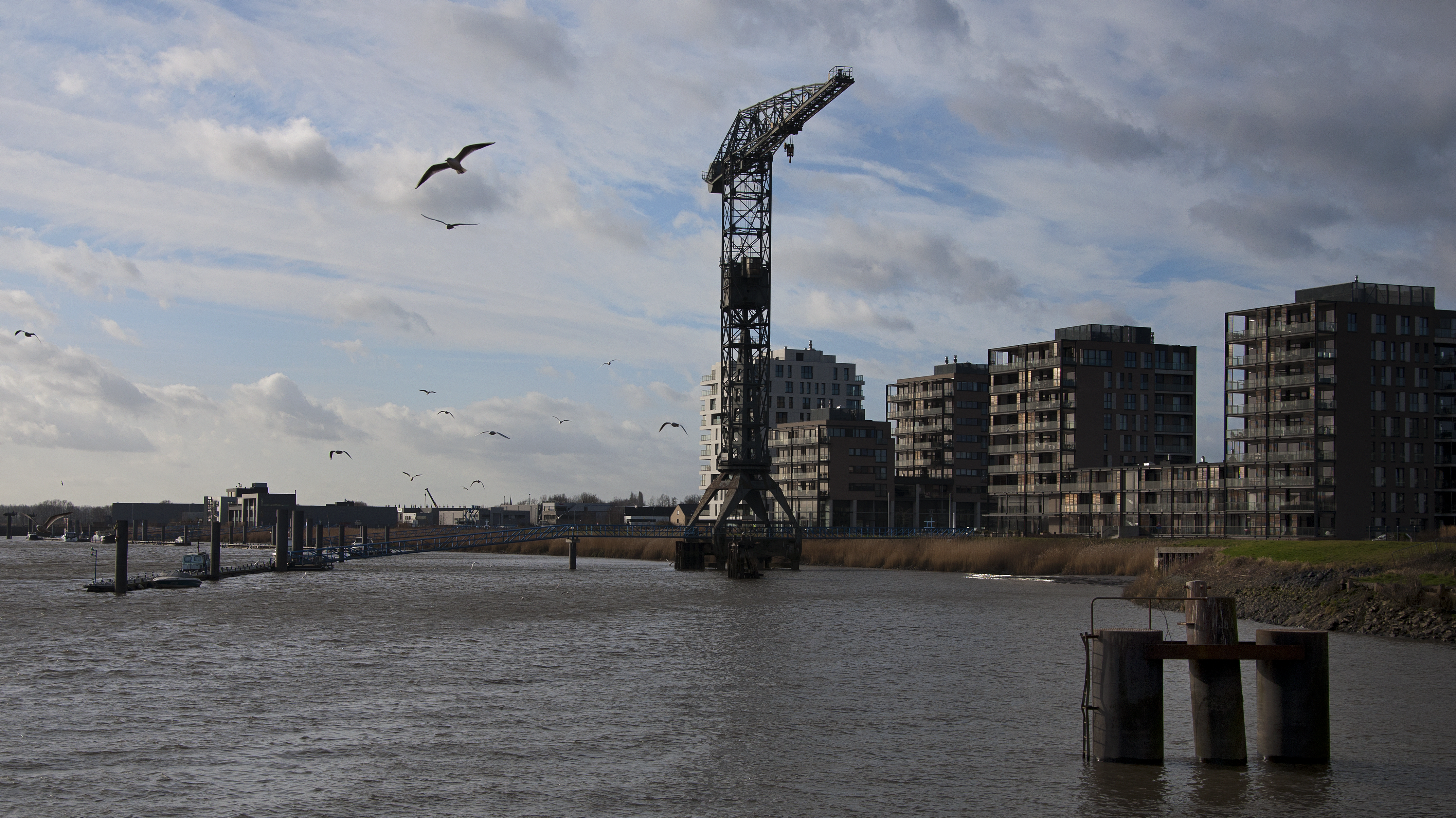 De voormalige Boelwerf te Temse, België